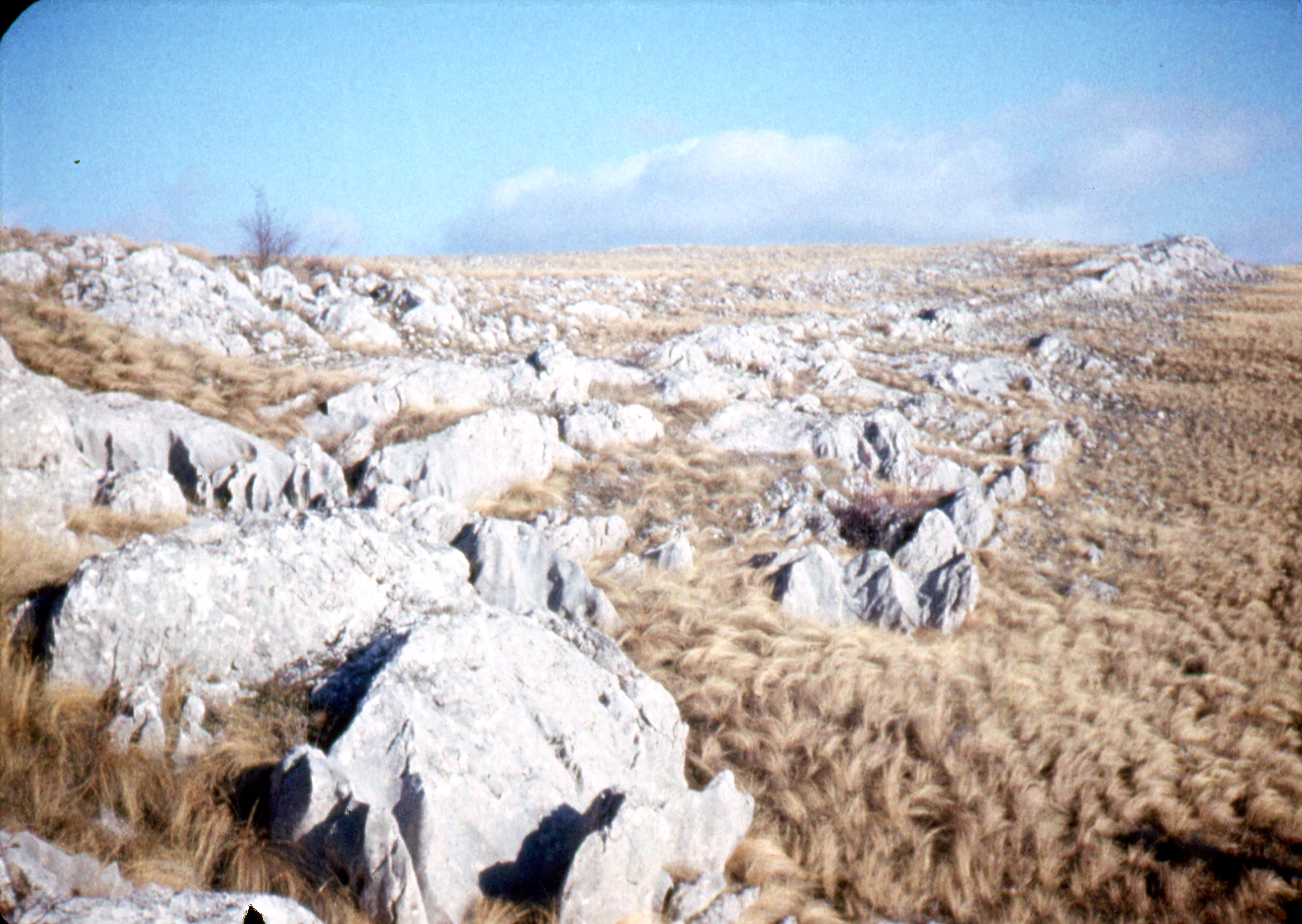 Крым. Карры на Караби